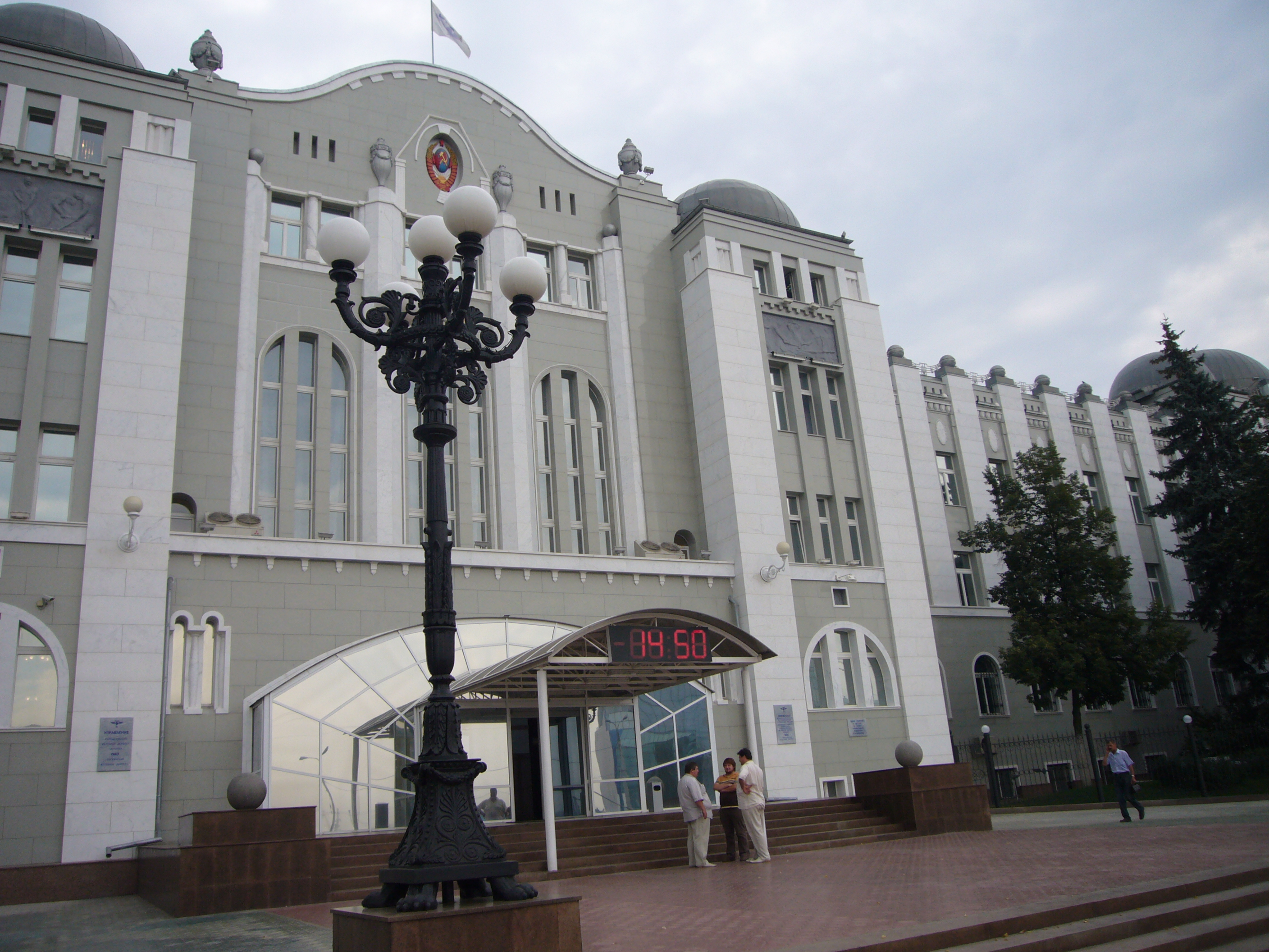 Здание управления Самаро-Златоустовской железной дороги